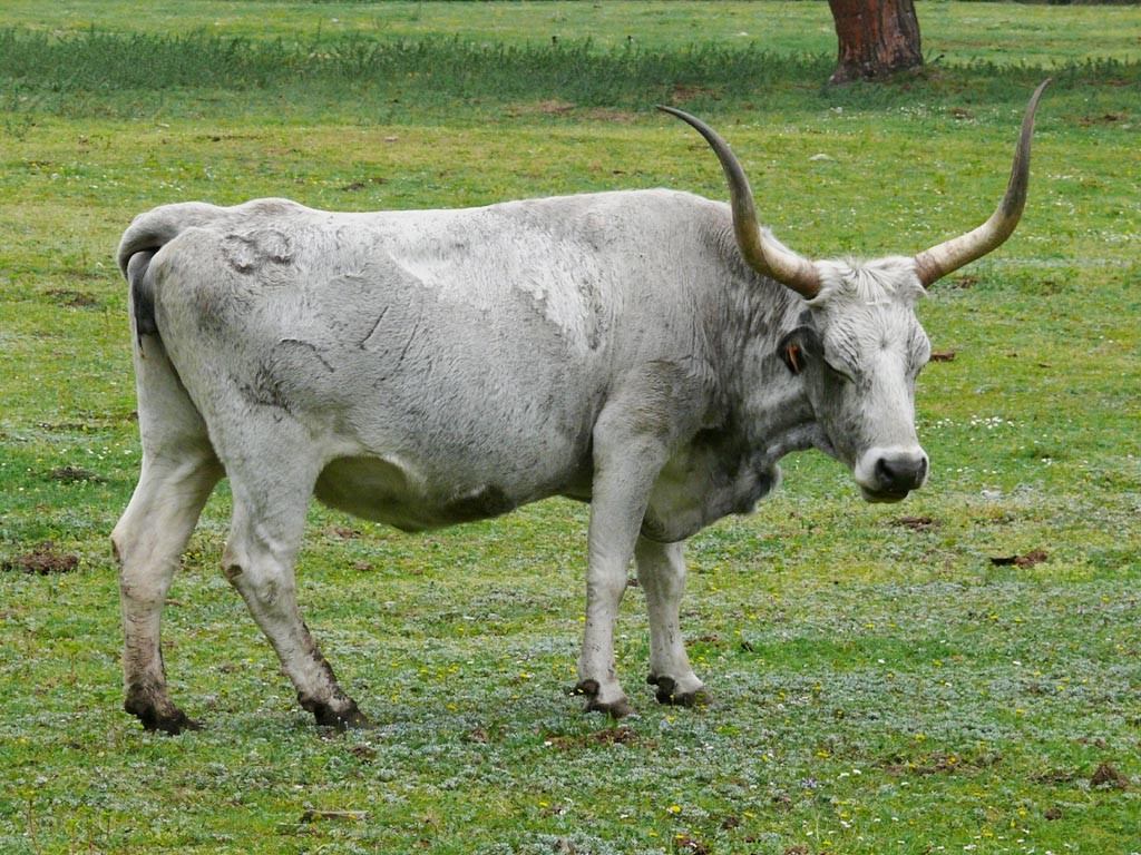 Maremma cattle